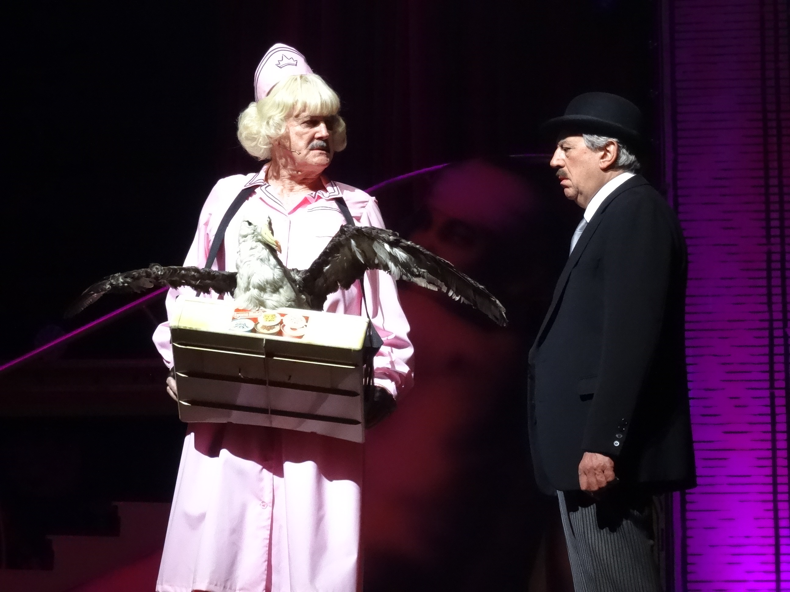 Photo 02-07-14 12 31 19